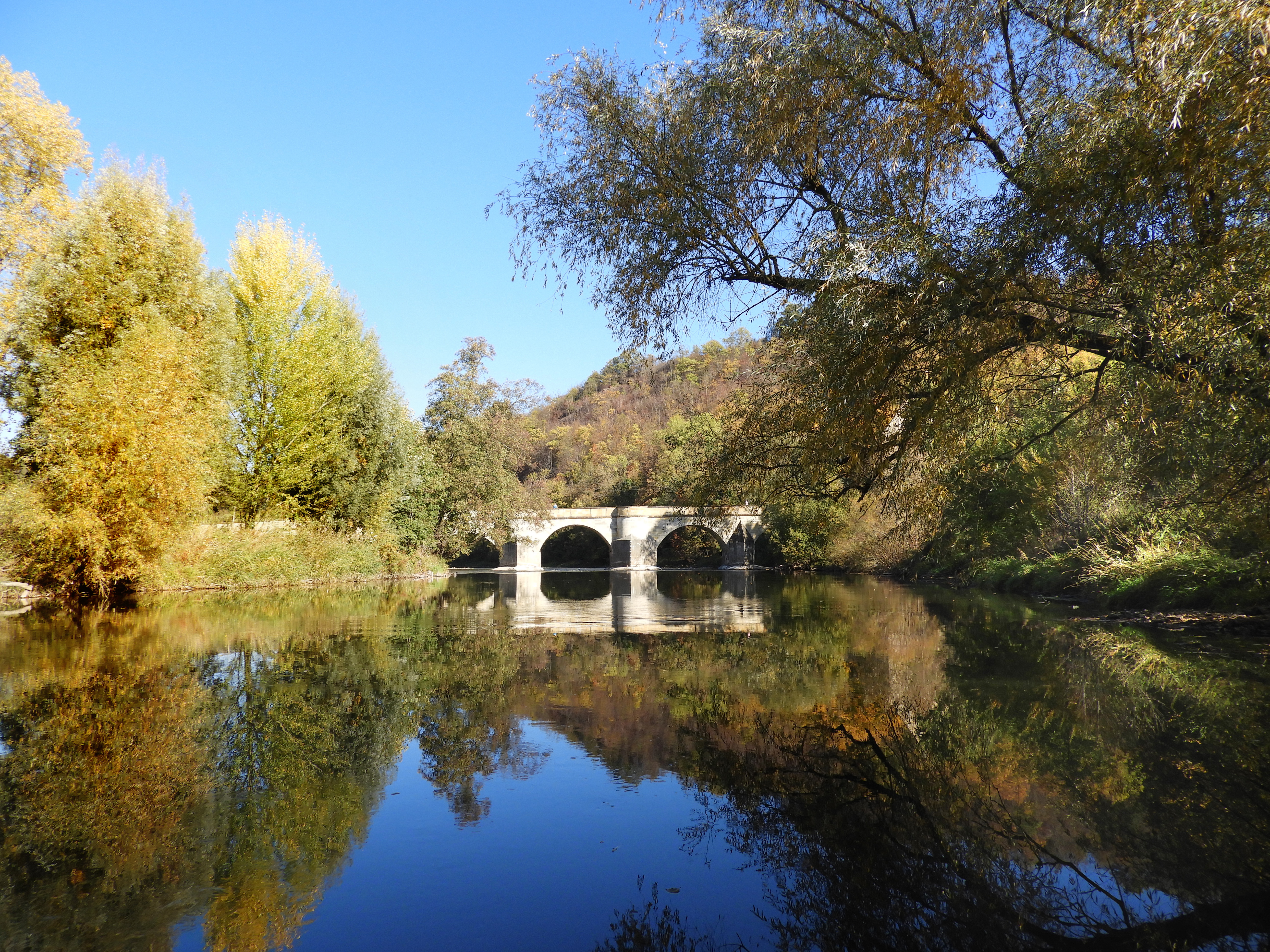 Der Flusslauf der Werra bei Creuzburg ist ein Teil des Flora-Fauna-Habitat-Gebiets „Werra bis Treffurt mit Zuflüssen“ mit der Nummer 5328-305 und der thüringeninternen Kennung 111. Die zahlreichen Teilflächen des Schutzgebietes erstrecken sich im Werratal von dem Quellbereich bis zur Landesgrenze bei Treffurt. Im Bildmittelpunkt die im Jahr 1223 errichtete denkmalgeschützte Brücke, die als die älteste Natursteinbrücke im mittleren und östlichen Deutschland angesehen wird.